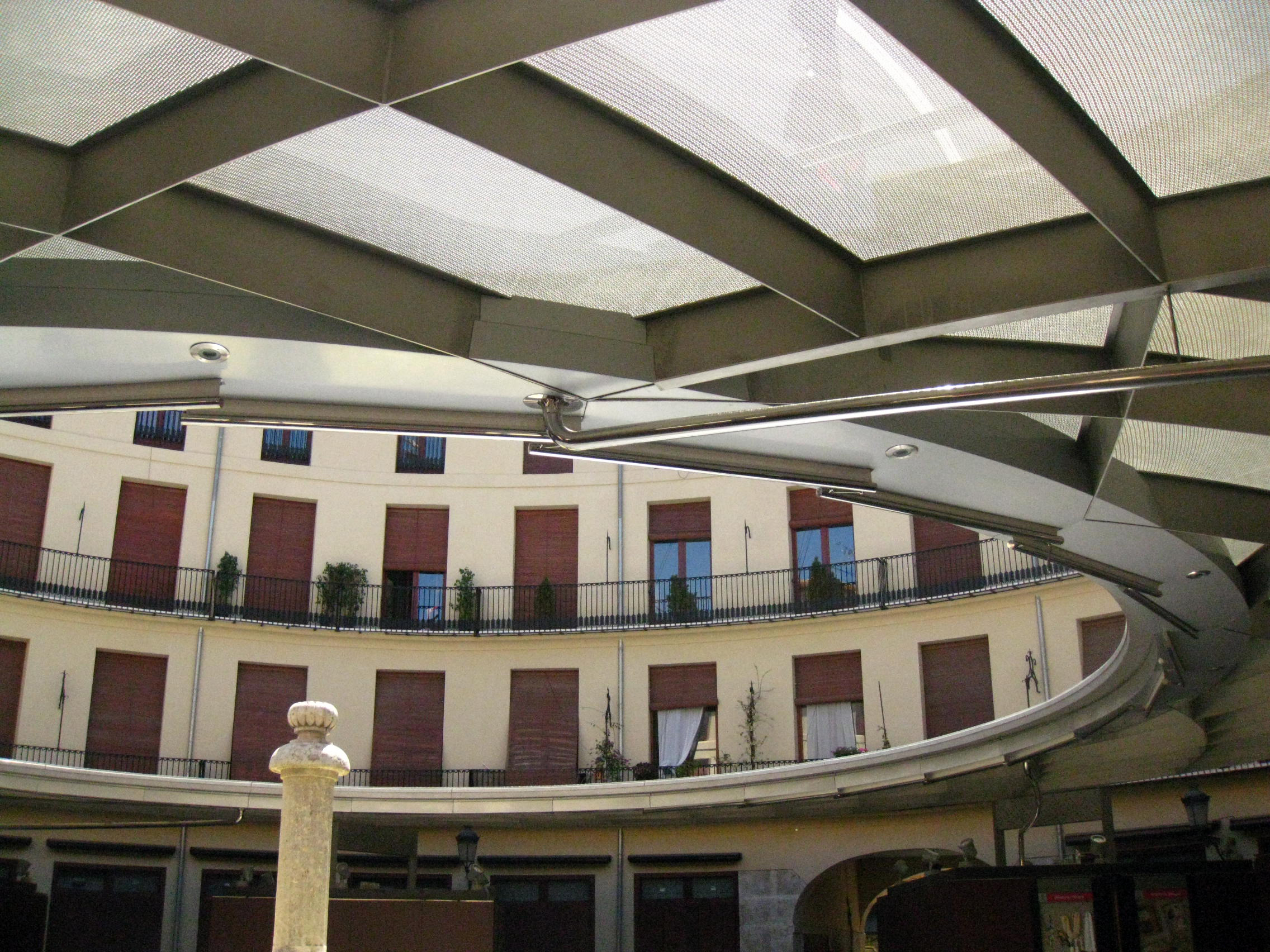 Plaça Redona (València) 15.250-127.